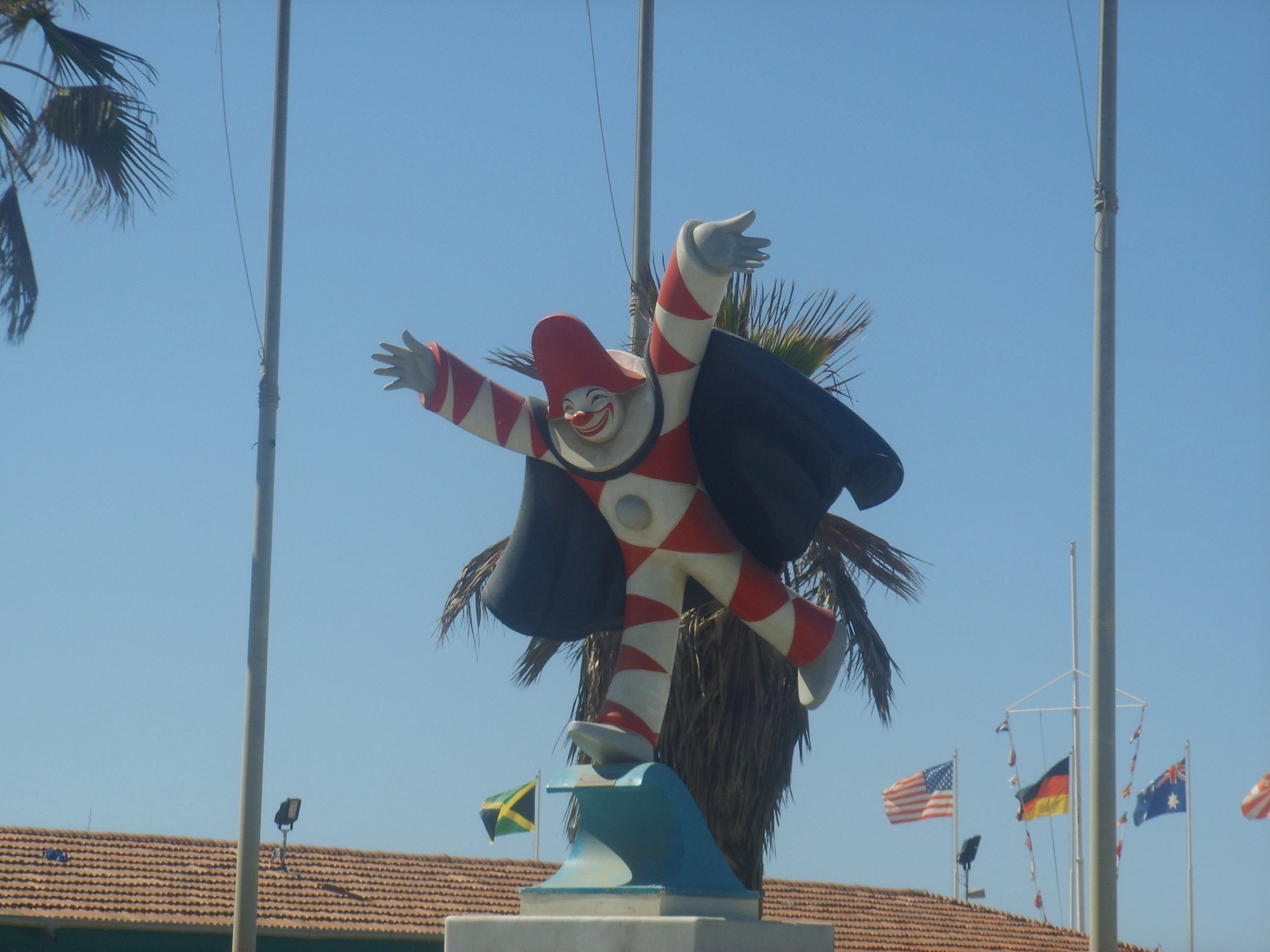 Il Burlamacco, Viareggio, Italy